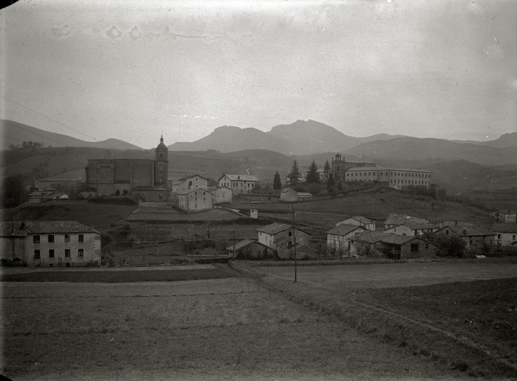 Título original: Vista general de la localidad de Urnieta (1/1) Localización: Urnieta (Guipúzcoa)